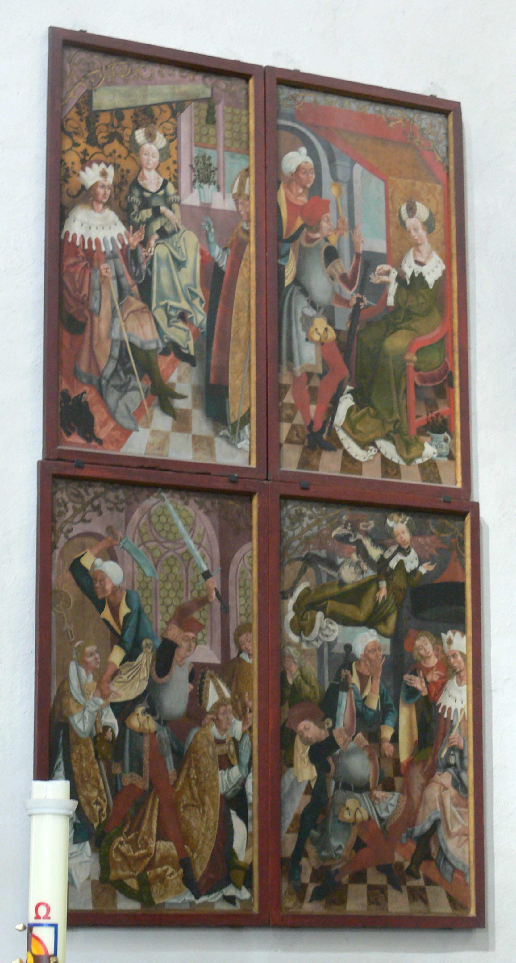 Stadtpfarrkirche St. Maria Magdalena, Münnerstadt Veit Stoß: Altartafeln zur Kilianslegende